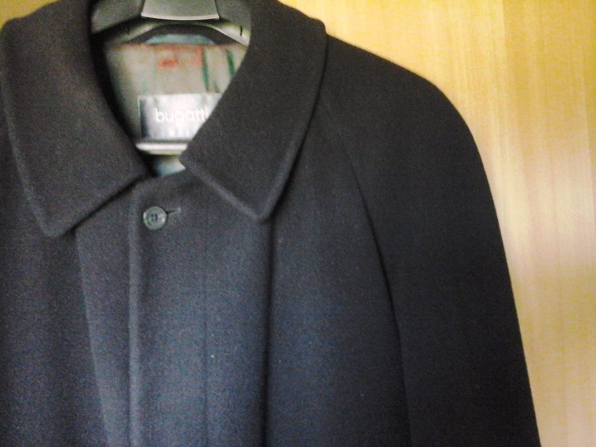 Raglonomaniko